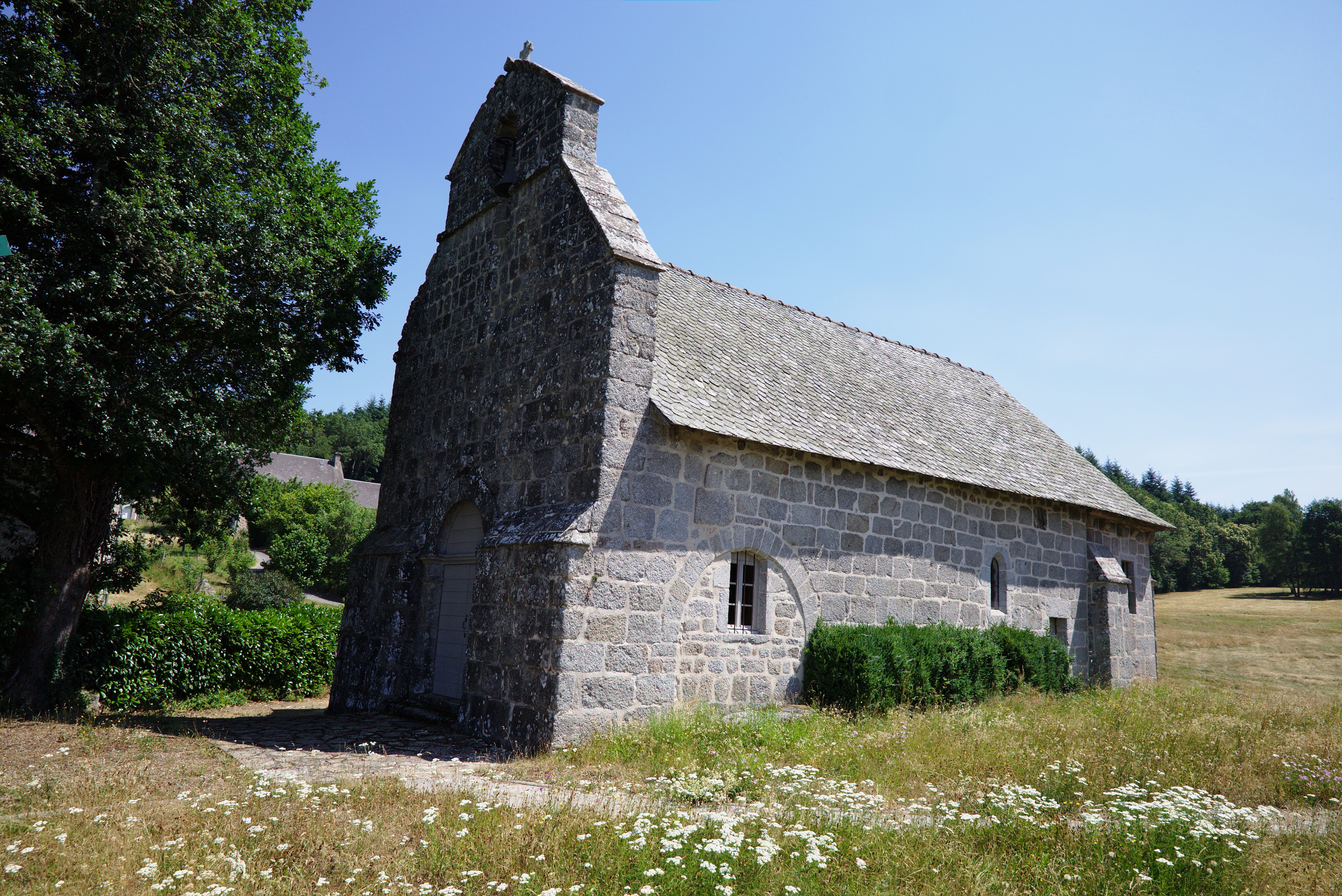 Église d'Alleyrat